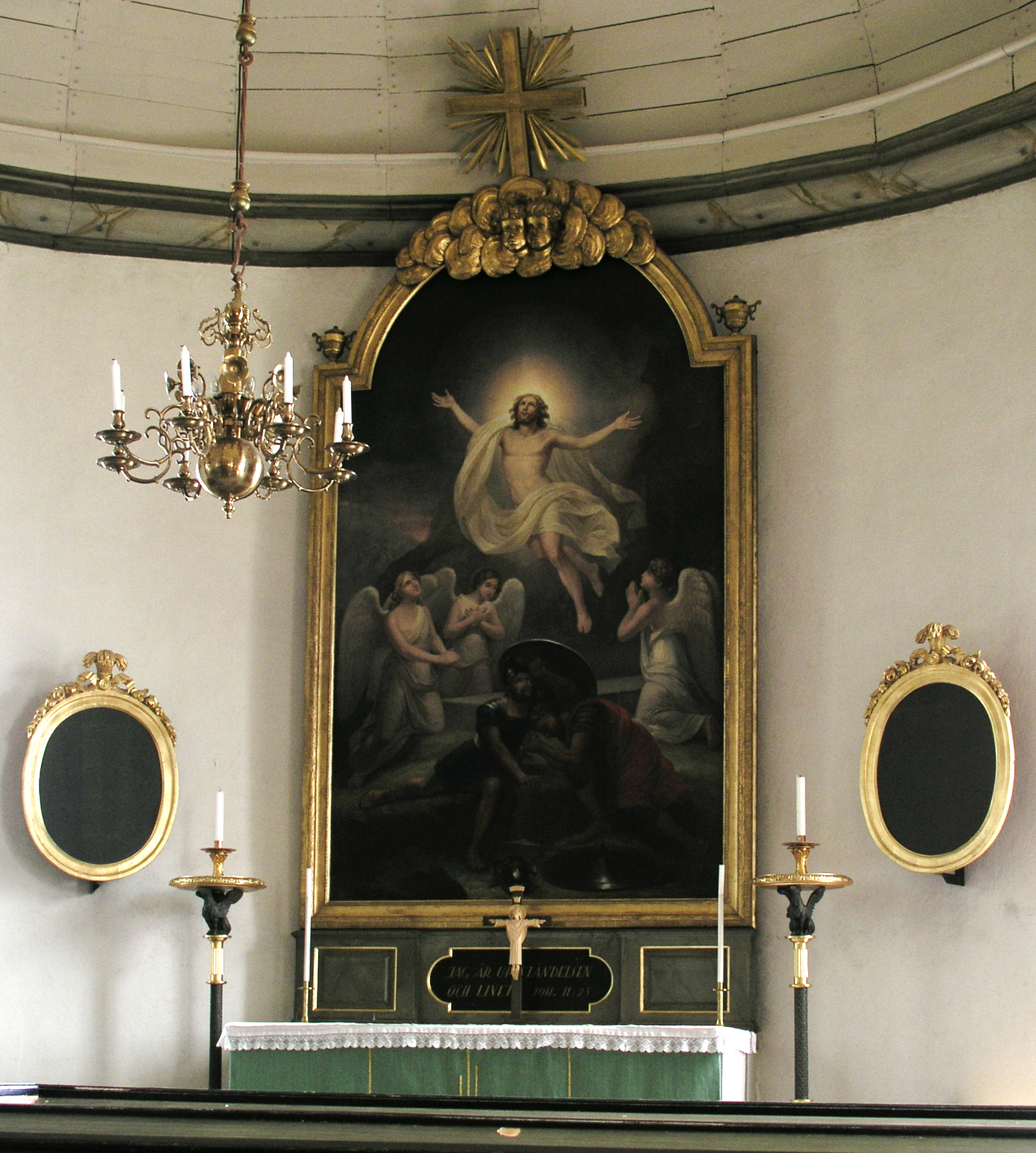 Lerbäcks kyrka, Askersund, Sweden. Altar painting.